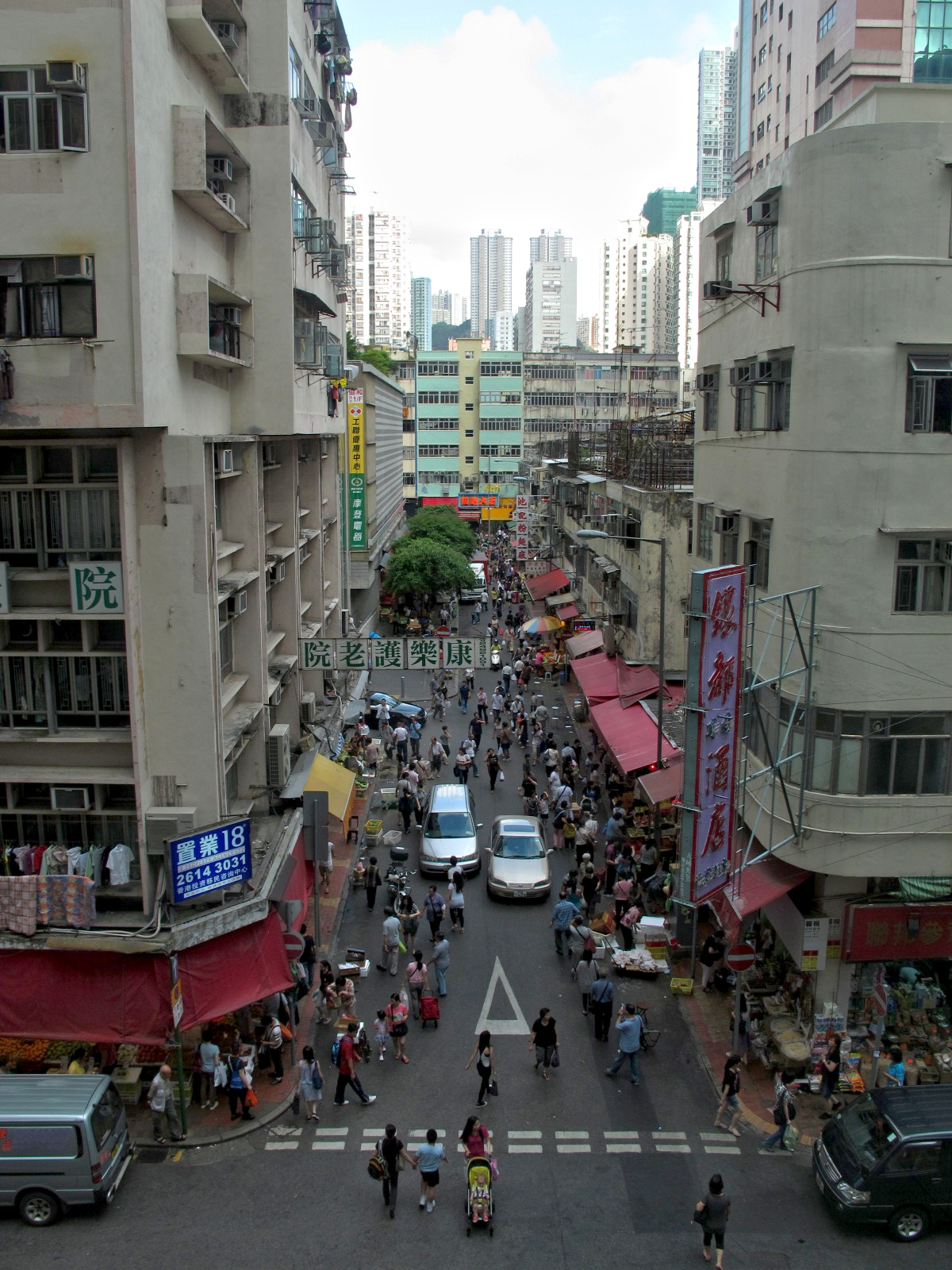 San Tsuen Street in Tsuen Wan 新村街